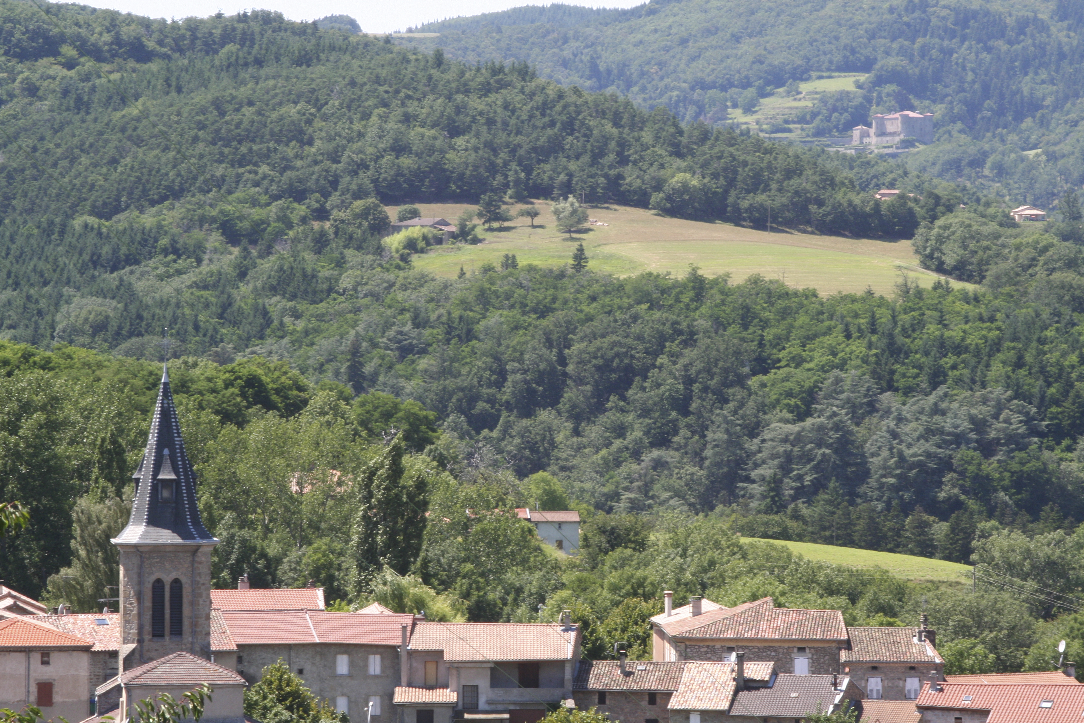 Gilhoc sur Ormèze